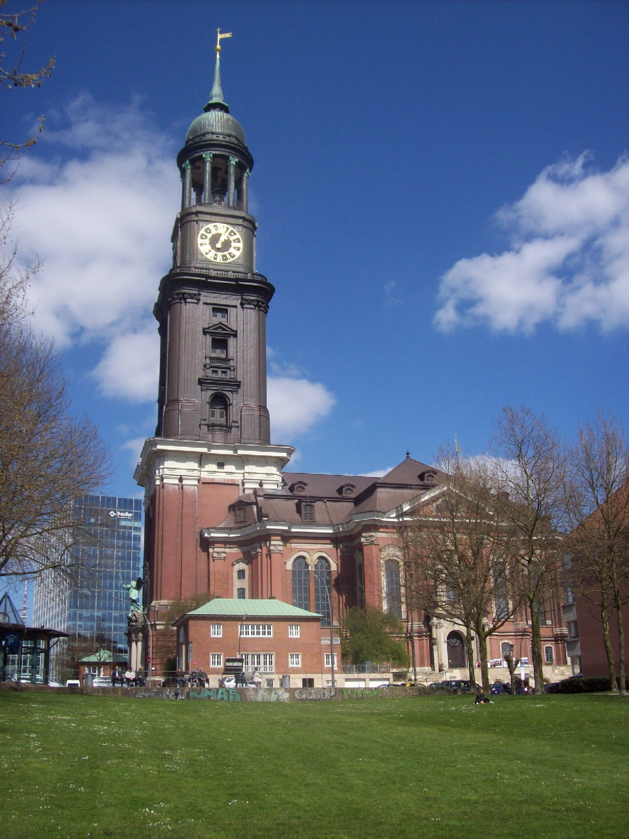 Das Ensemble St. Michaelis-Kirche von der Südseite Richtung Englische Planke. Standort Winklerstraße. Turm mit Kirchenschiff und Pastorat, Gemeindehaus.This is a photograph of an architectural monument.